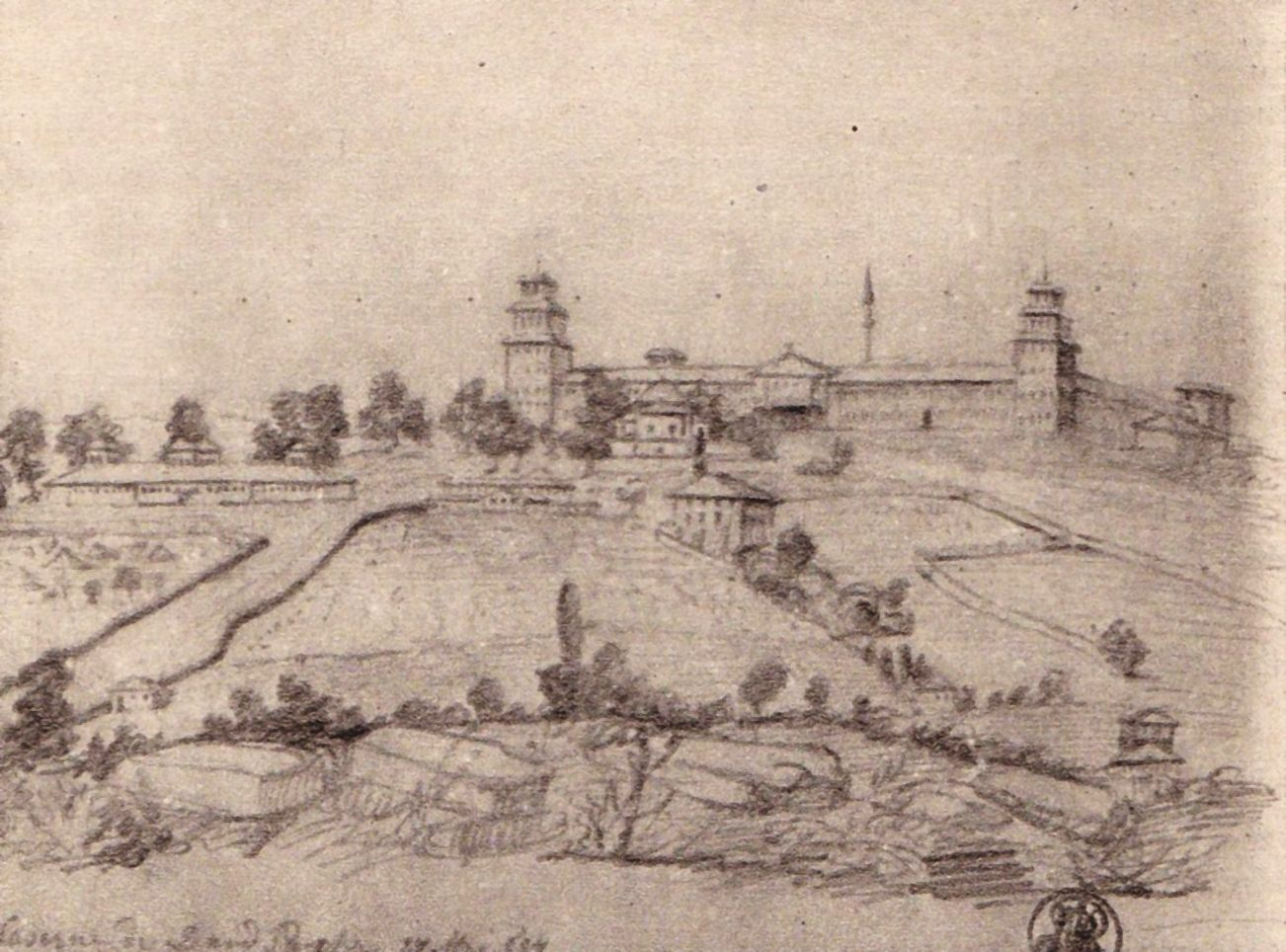 Cazarma lui David Pasa